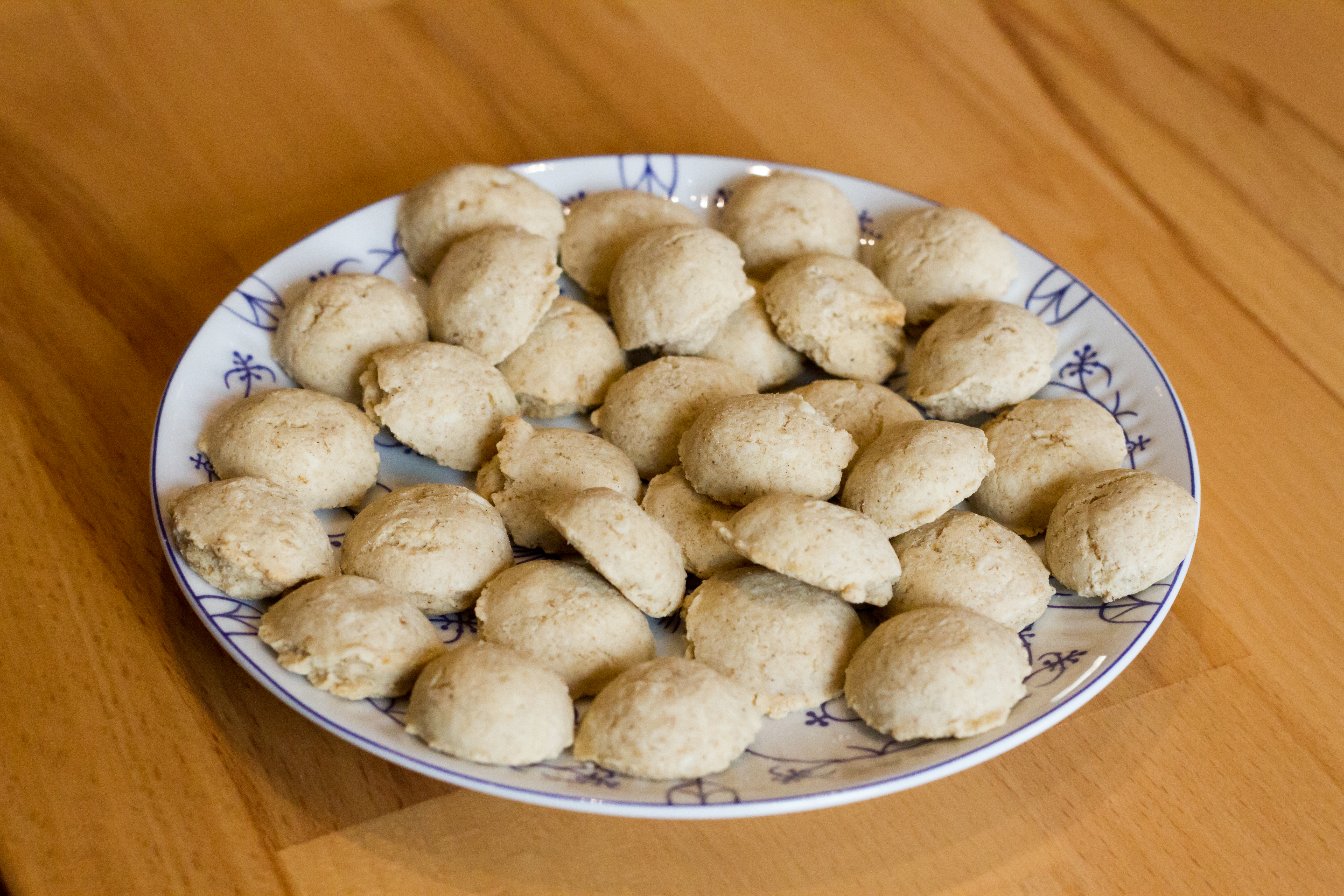 Ostfriesische Pfeffernüsse